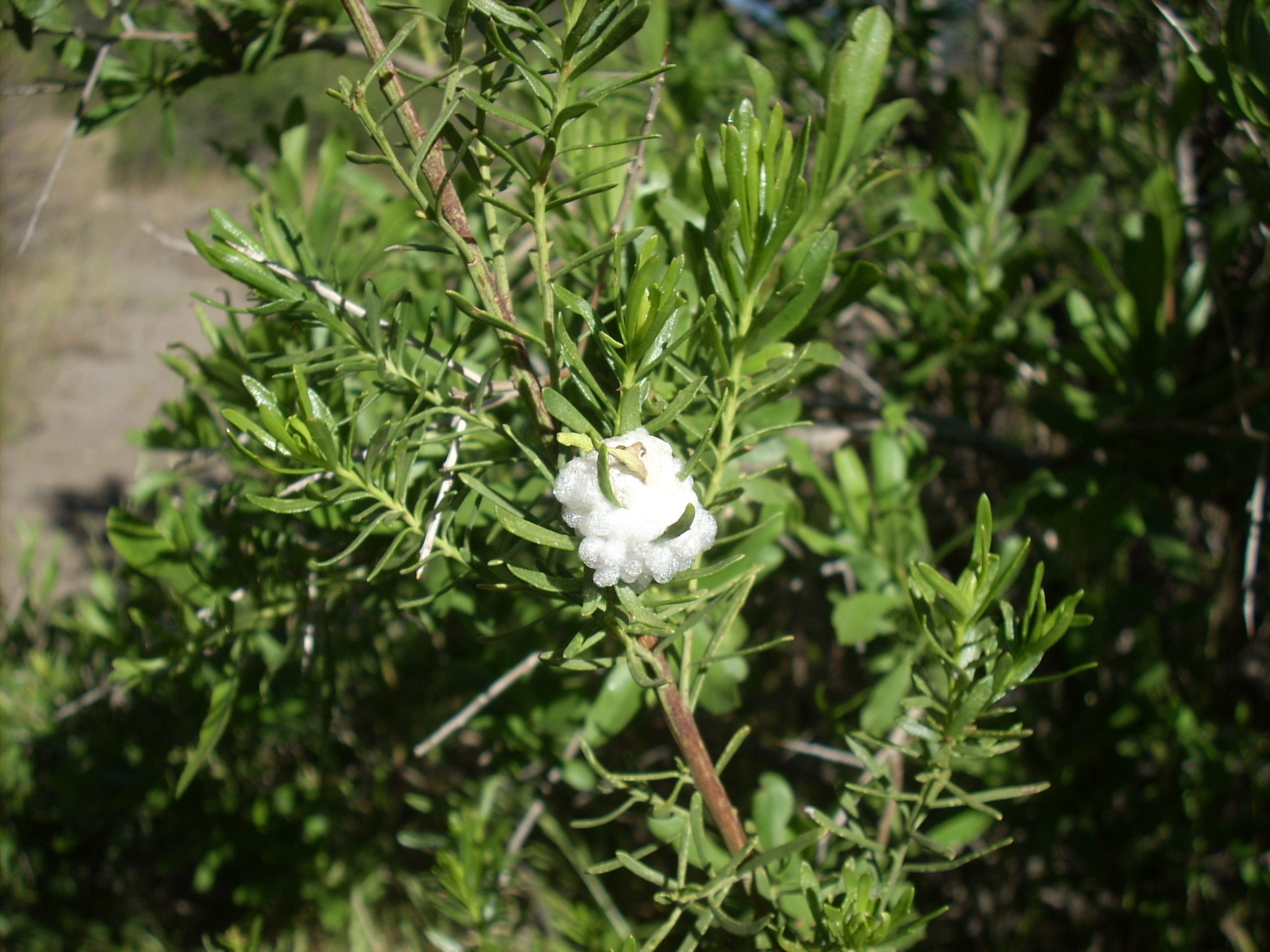 Romerillo, Baccharis linearis con cecidias, Reserva Nacional Río de los Cipreses, Provincia de Cachapoal, Región de O'Higgins.